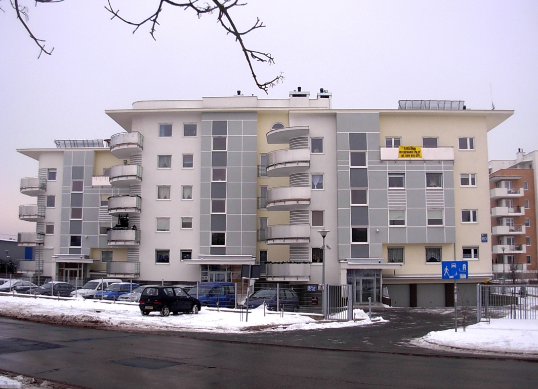 Zabudowa przy ul. Dąbrowa na osiedlu Glinki w Bydgoszczy